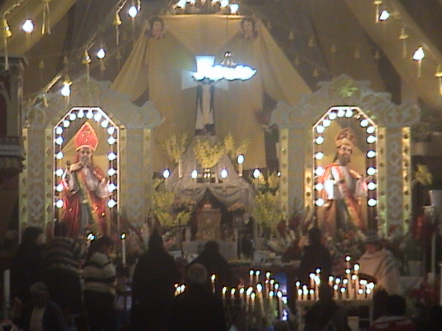 Fiesta de San Pedro y San Pablo en el municipio de San Benito